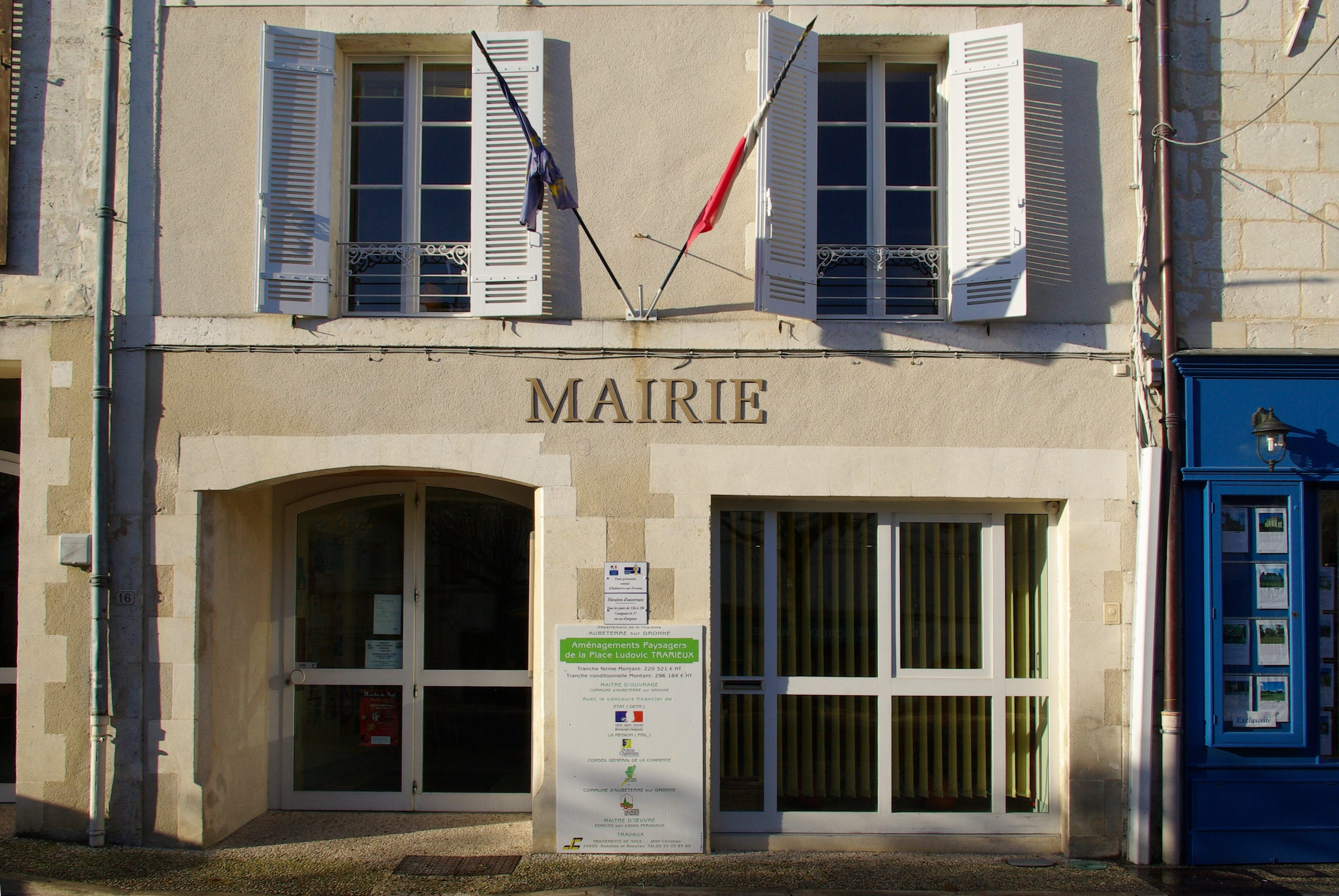 Mairie d'Aubeterre-sur-Dronne, Charente, France.